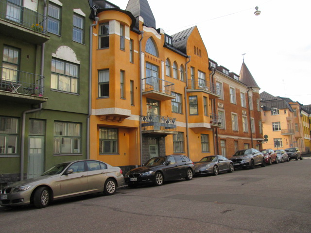 Huvilakatu; 12 och 14 (molemmat G. W. Nyberg 1910) 16 (Nyberg & Löpönen 1906)